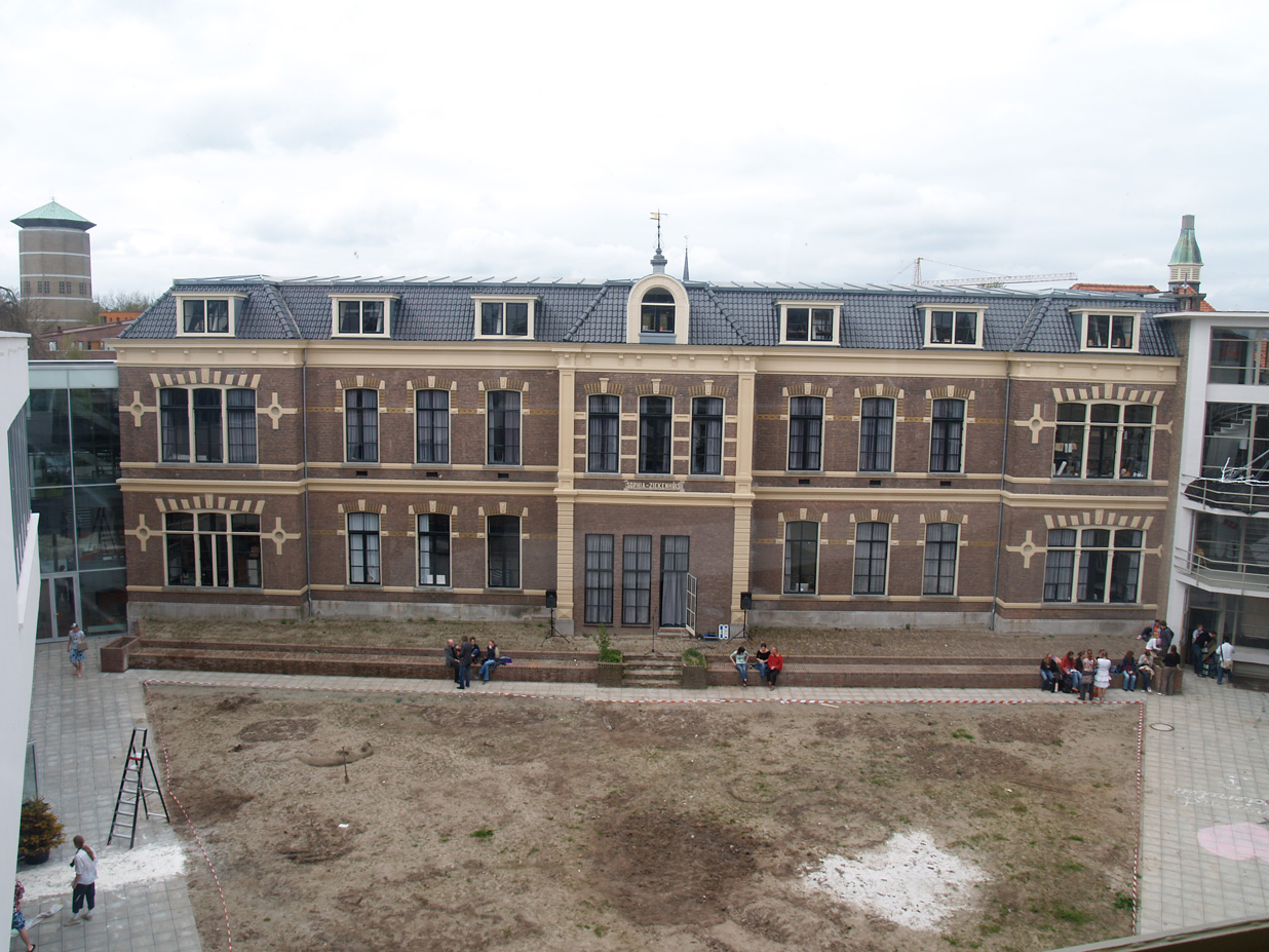 Het oude Sophia-ziekenhuis in Zwolle, nu deel van de kunstacademie van ArtEZ